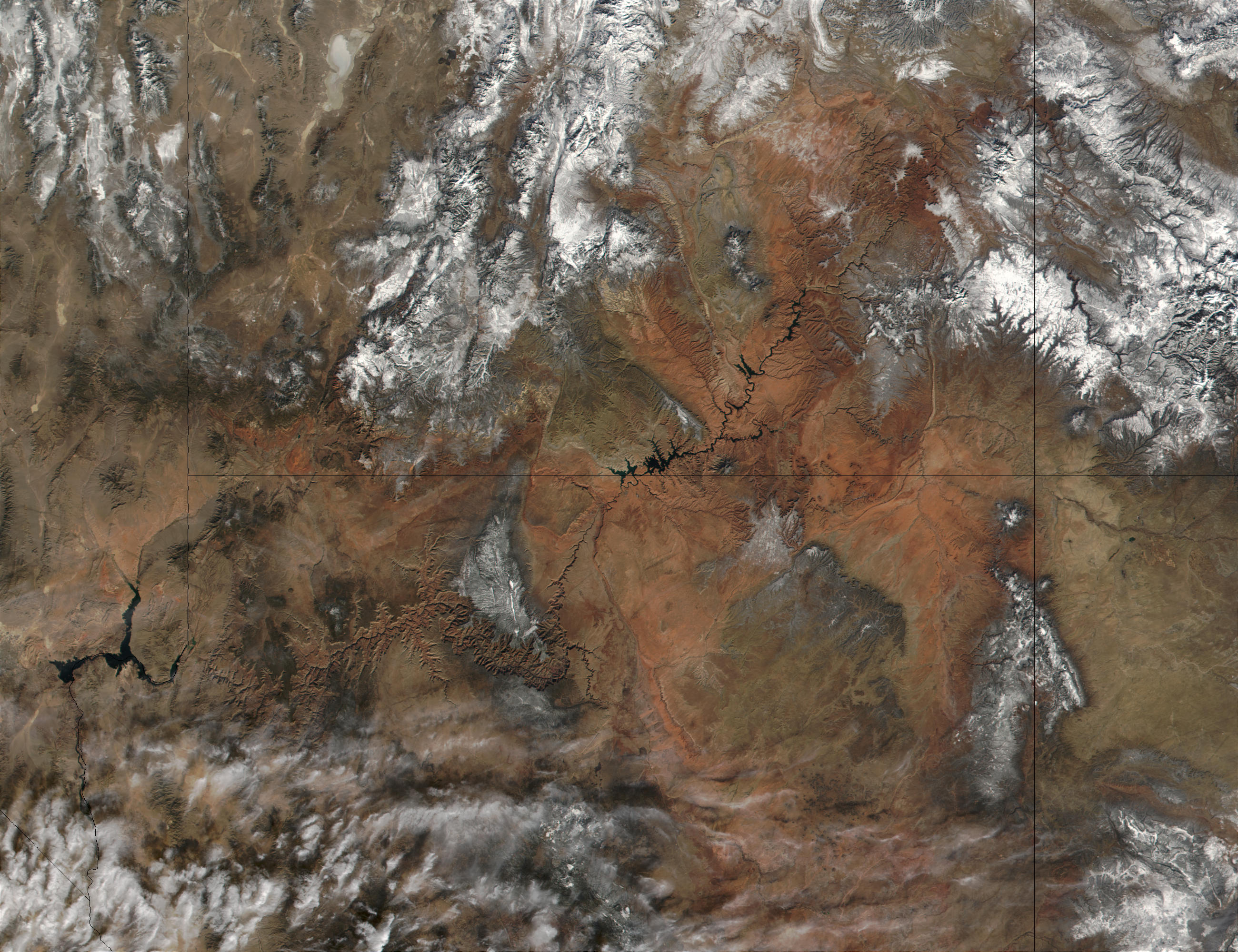 Bron